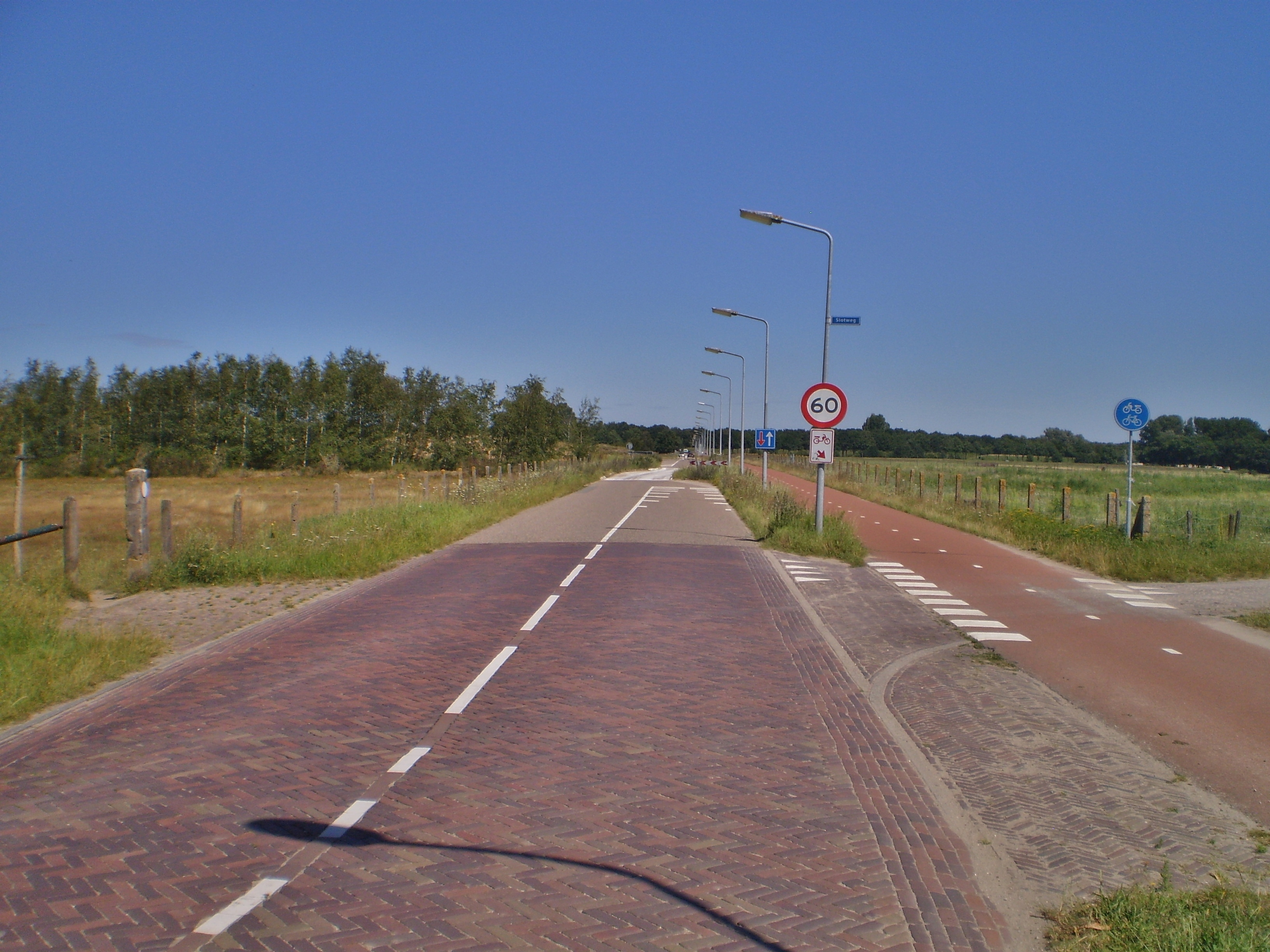 Gezien vanuit Blaricum richting Bijvanck. Links natuurgebied 't Harde en de groeve Oostermeent